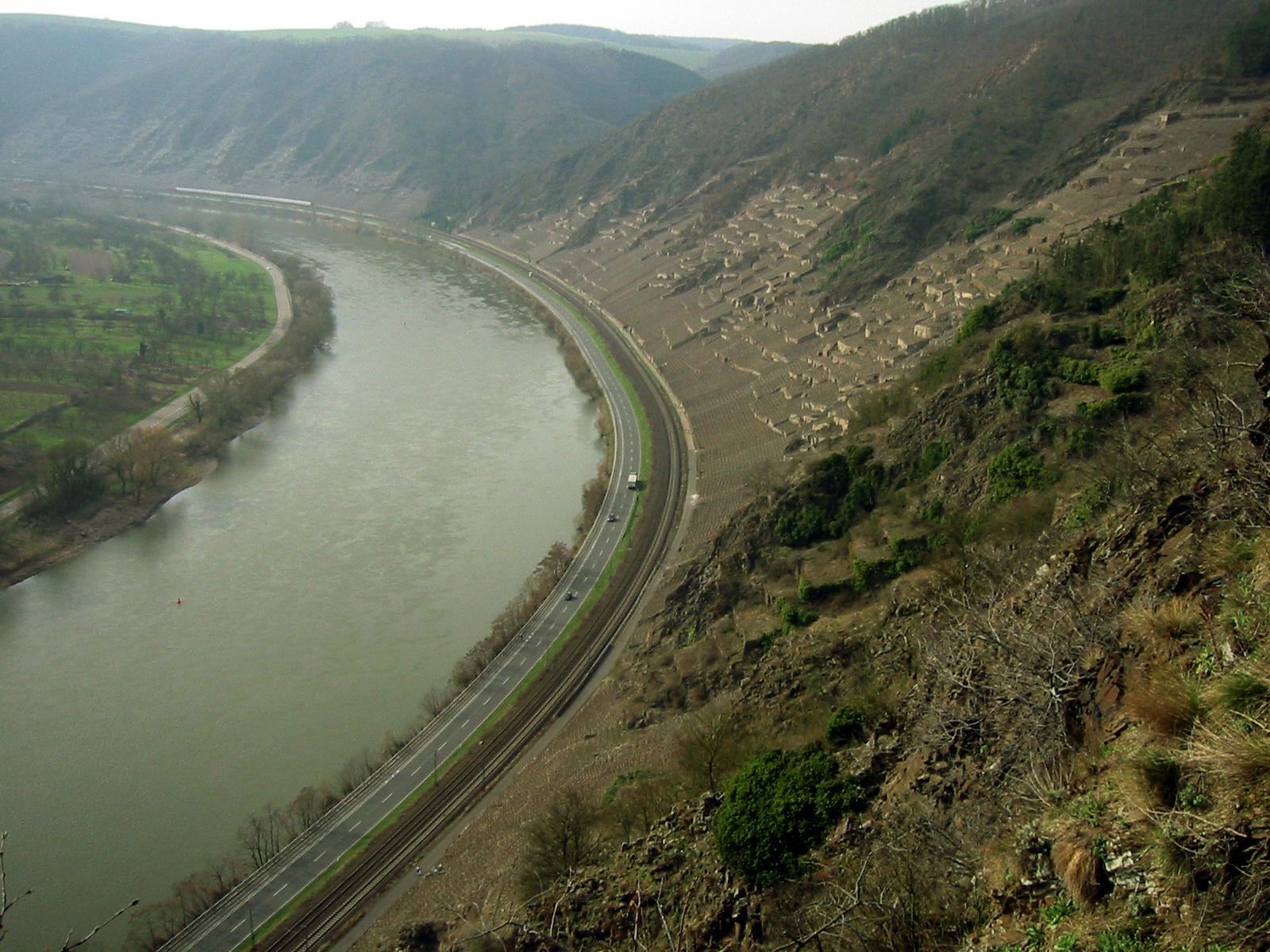 Terrassierte Steillagenweinberge an der Untermosel („Terrassenmosel“). Lagenname: Koberner Uhlen (Hintergrund) und Winninger Uhlen (Vordergrund)